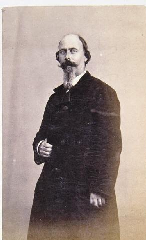 Cecilio Pizarro.